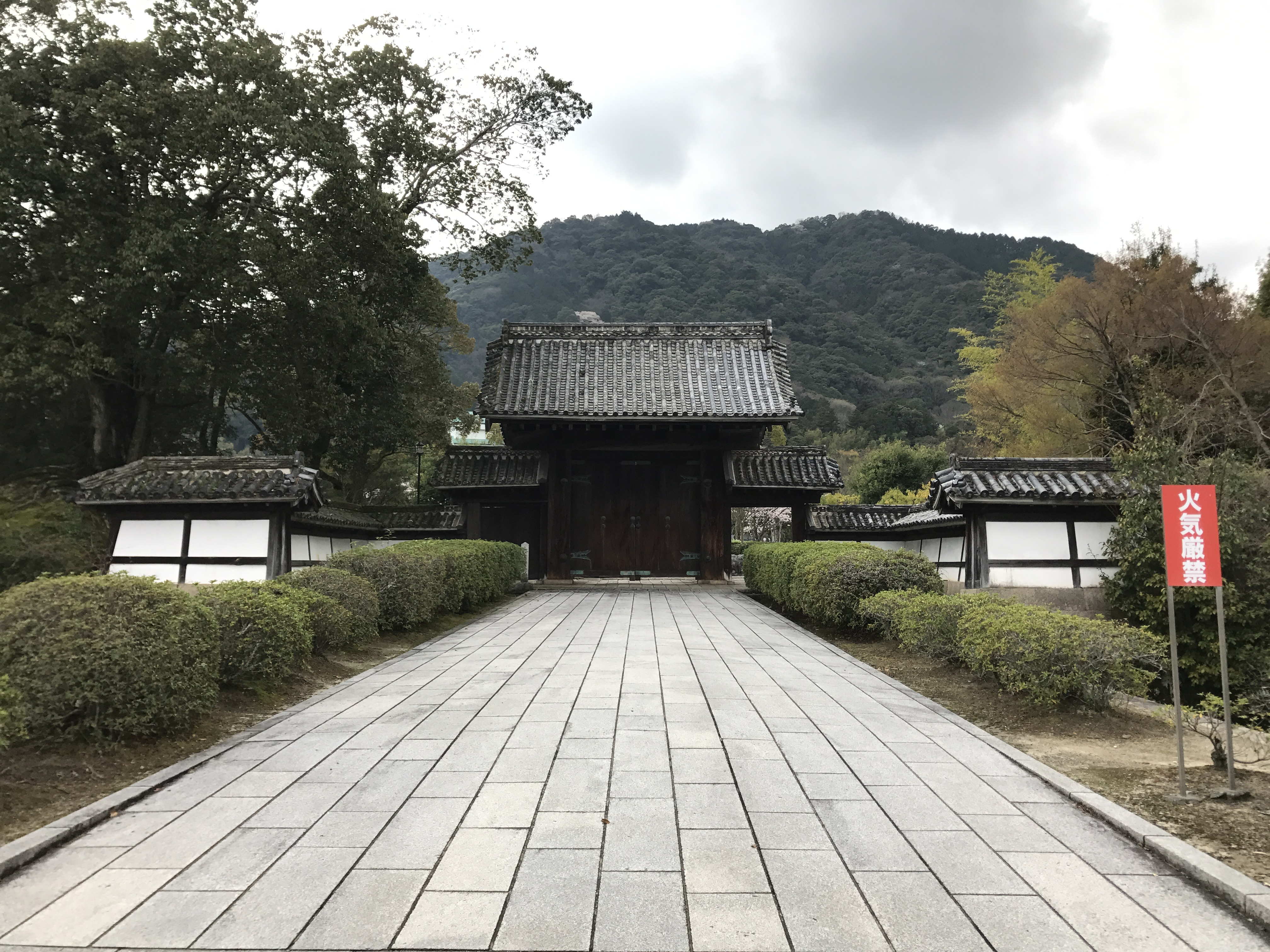 山口城表門(旧山口藩庁門)